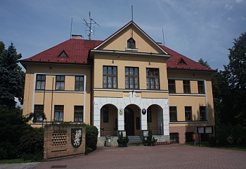 Obecní úřad Stonava